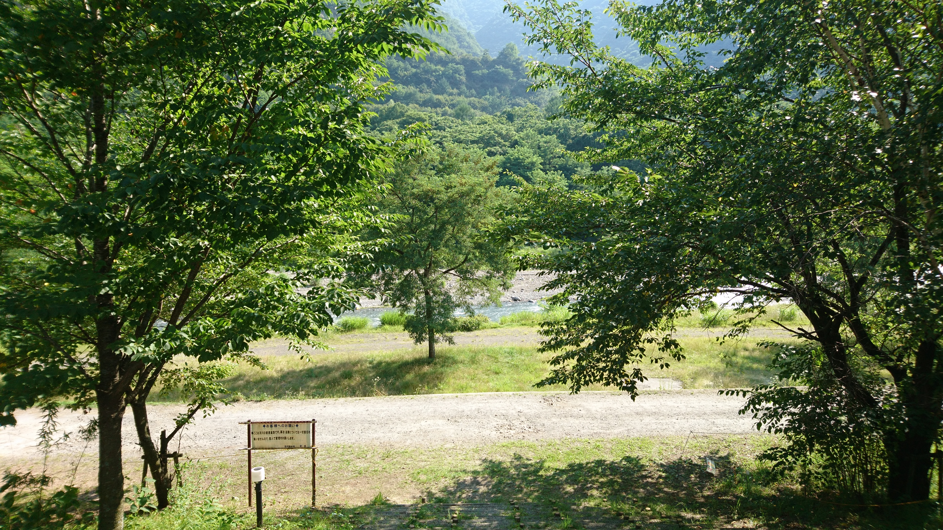 道の駅信州蔦木宿から釜無川へ徒歩で下りられる。車両立ち入り禁止。